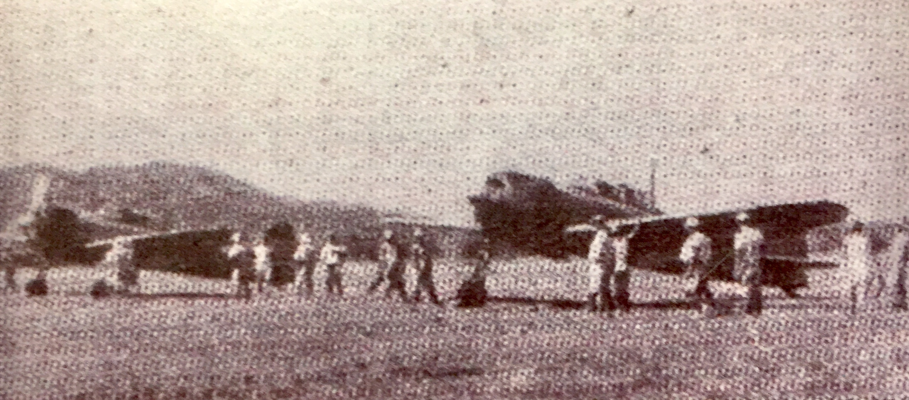 1942年夏，停放在槟城机场的日本鹿屋航空队的零式21型战斗机。同年9月，该机飞往南太平洋的拉包尔作战。